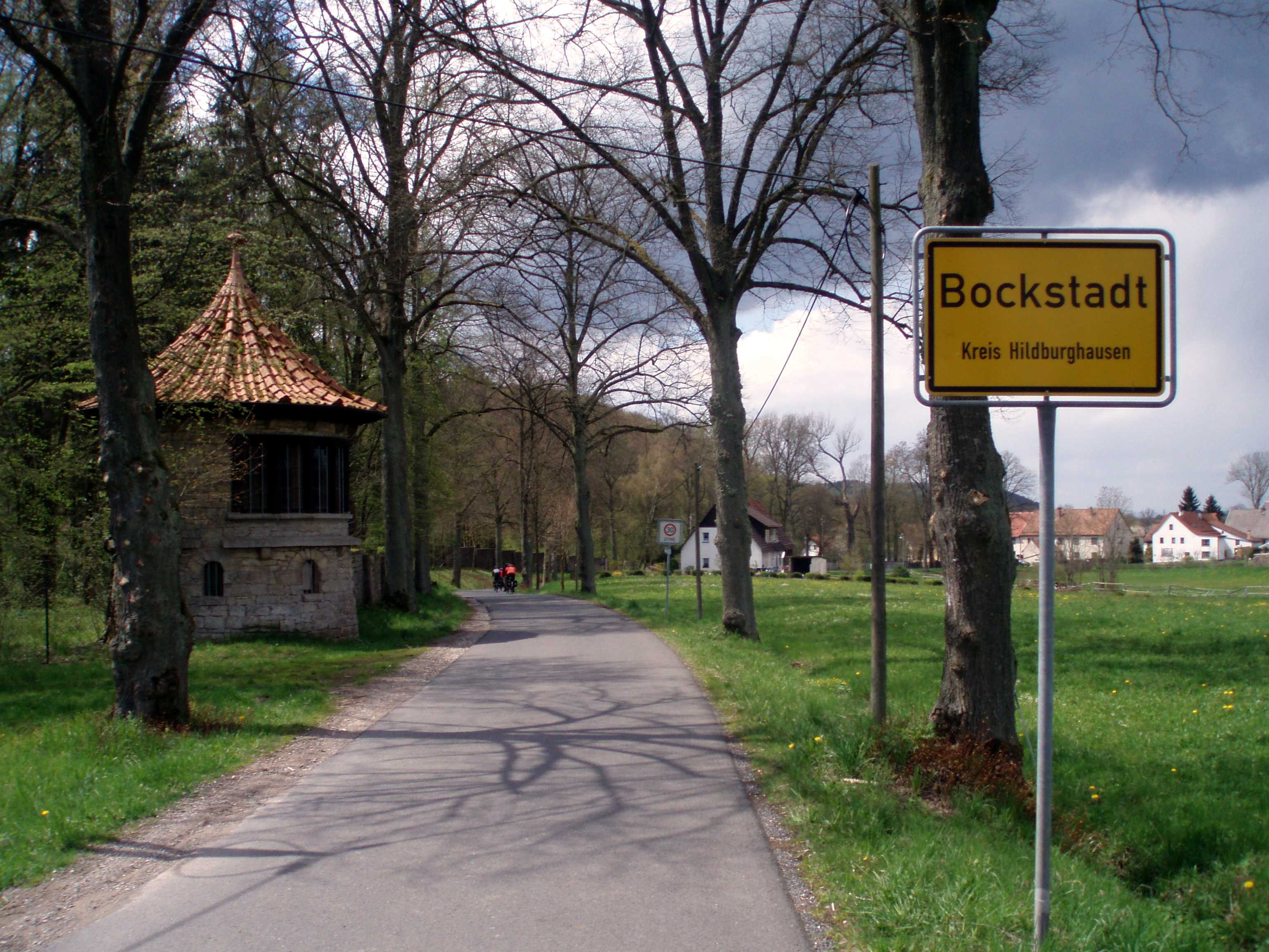 Ortseingang von Bockstadt aus Richtung Eisfeld